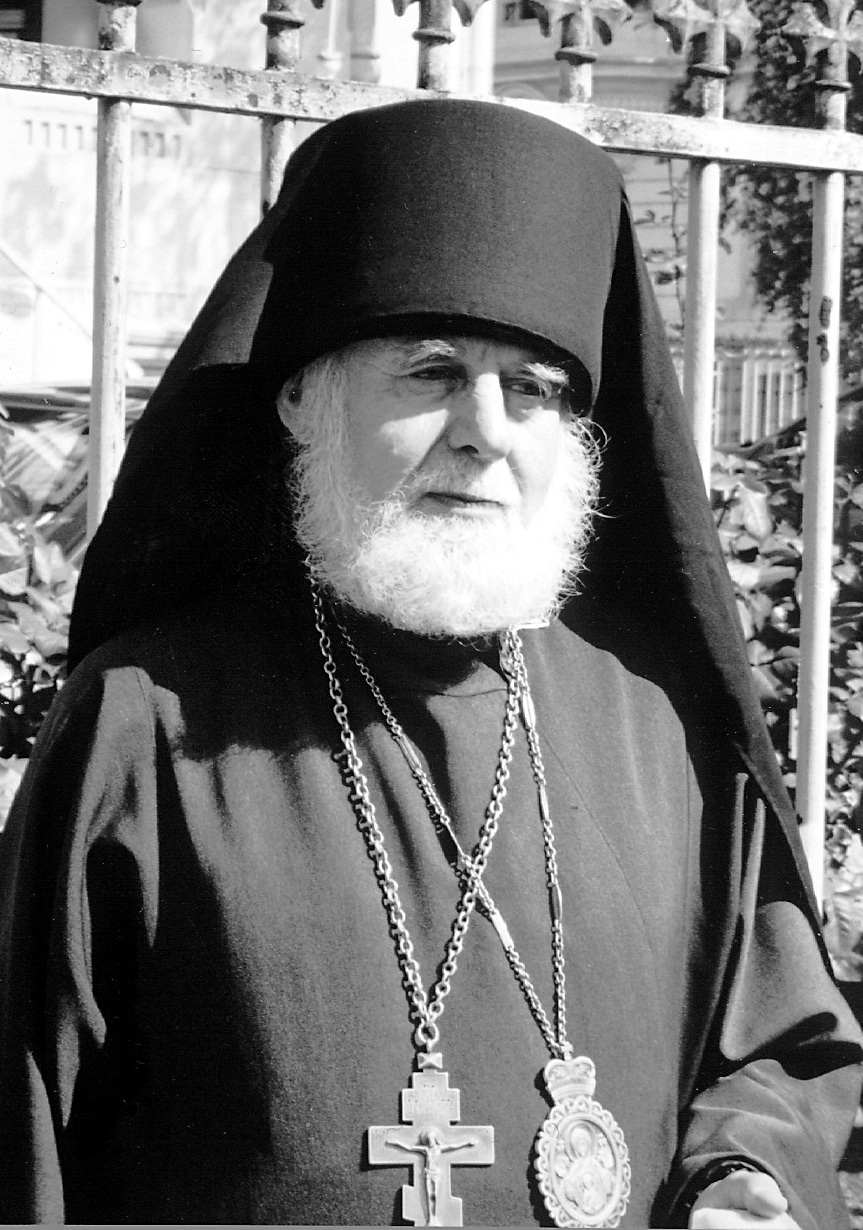 Епископ Серафим (Дулгов) у Крестовоздвиженского собора Женевы.